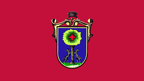 Bandera de Etxebarri, con fondo carmesí y estampado el escudo del pueblo.